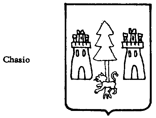 Encontramos que las armas de la familia Chasio se corresponden con las de la familia Chasco y su localización geográfica radicaría en Laminoria, Álava​. Constancia de lo señalado encontraremos en la Partida de Bautismo del año 1851 d.c. de Maguiz Chasio Casi, hija de Melchor Chasio y Vrsola Casi, referente a la parroquia de Santa Cruz de Campezo en la provincia de Álava​. Por tanto, la localización geográfica de los portadores del citado apellido se corresponde con la delimitación natural del apellido de Chasco en Tierra Estella y la Sonsierra Navarra.